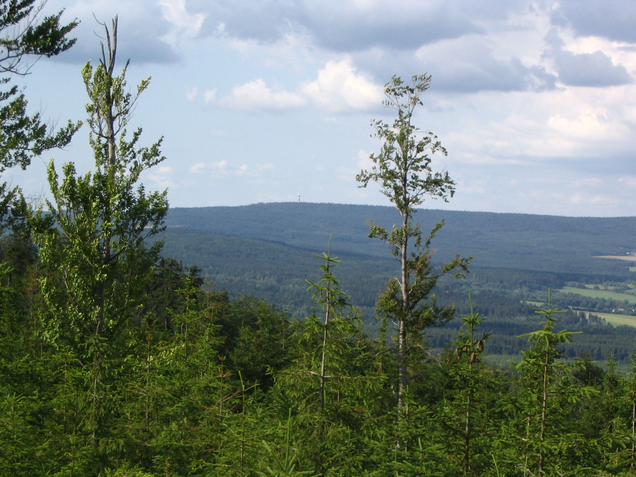 Střední Brdy z hřebene Třemšína